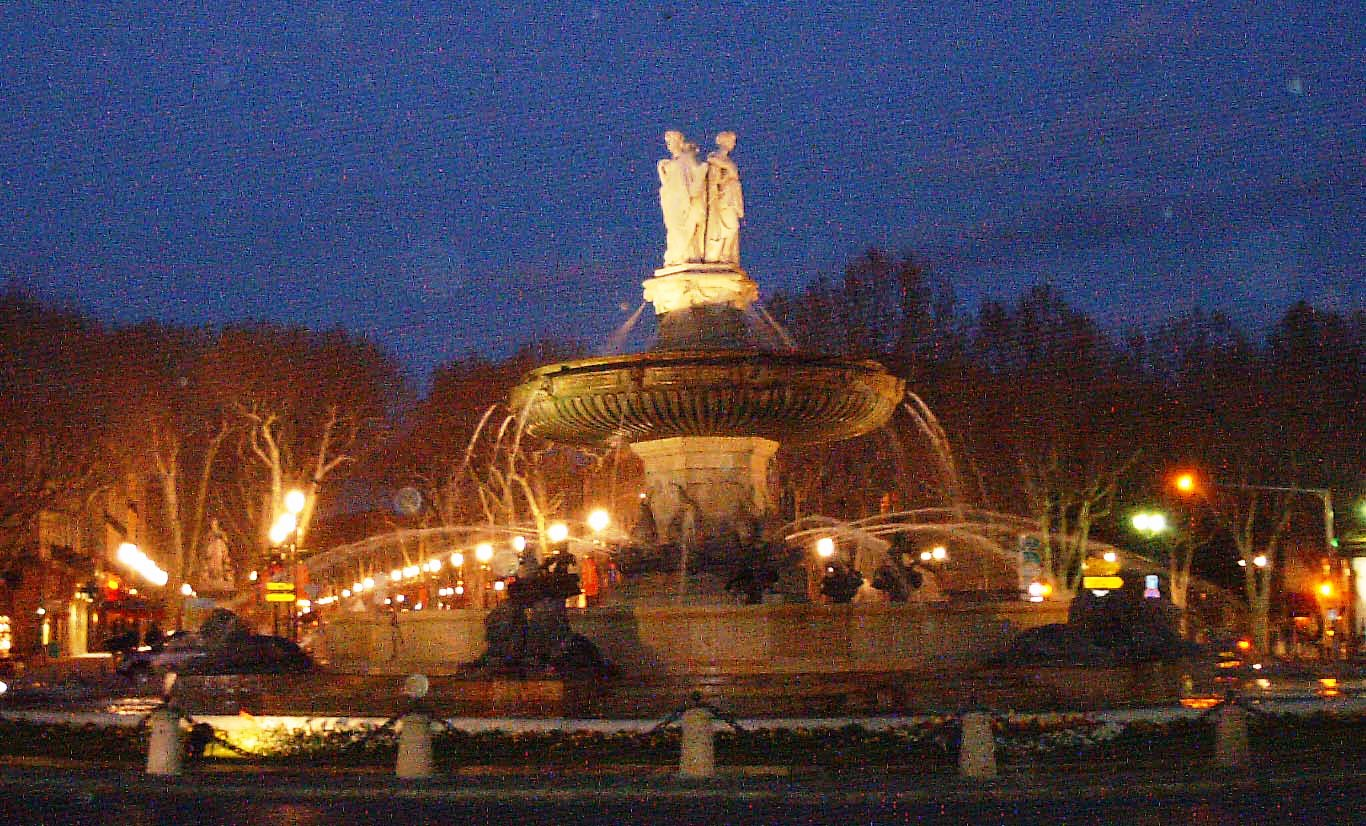 Fontaine de la Rotonde à Aix-en-Provence (France)